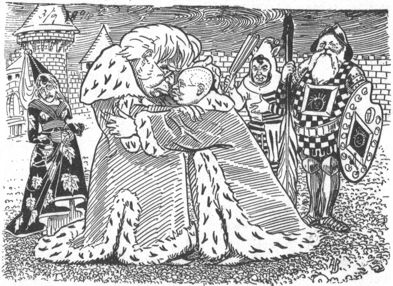 ""Kongen" og "Hs. Majestæt" mødes". Fra venstre: Christen Collin, Bjørnstjerne Bjørnson, Gunnar Heiberg, Olaf Thommessen, Christian Krohg. Karikatur av Andreas Bloch i "Korsaren" 1896.